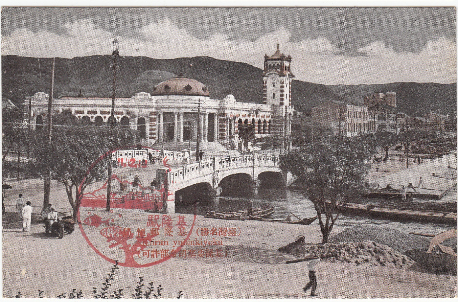 在基隆郵便局前方的橋樑是日新橋，位置即現今富狗橋。基隆郵局的所在地就是基隆郵便局的原址，是於1960年代被拆除。 Kiirun yubinkiyoku (基隆要塞司令部許可)